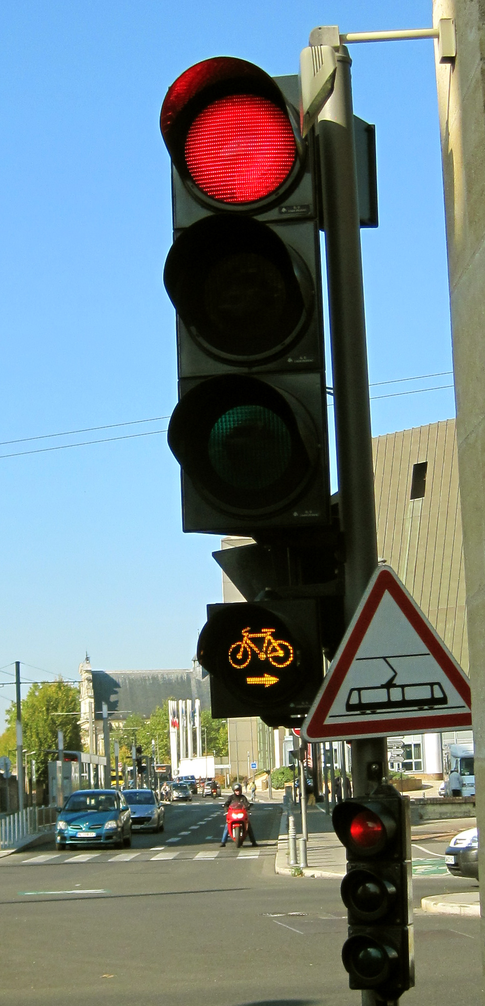 Feu clignotant autorisant le « tourne à droite » des cycliste au feu rouge. Bordeaux, rue François de Sourdis.